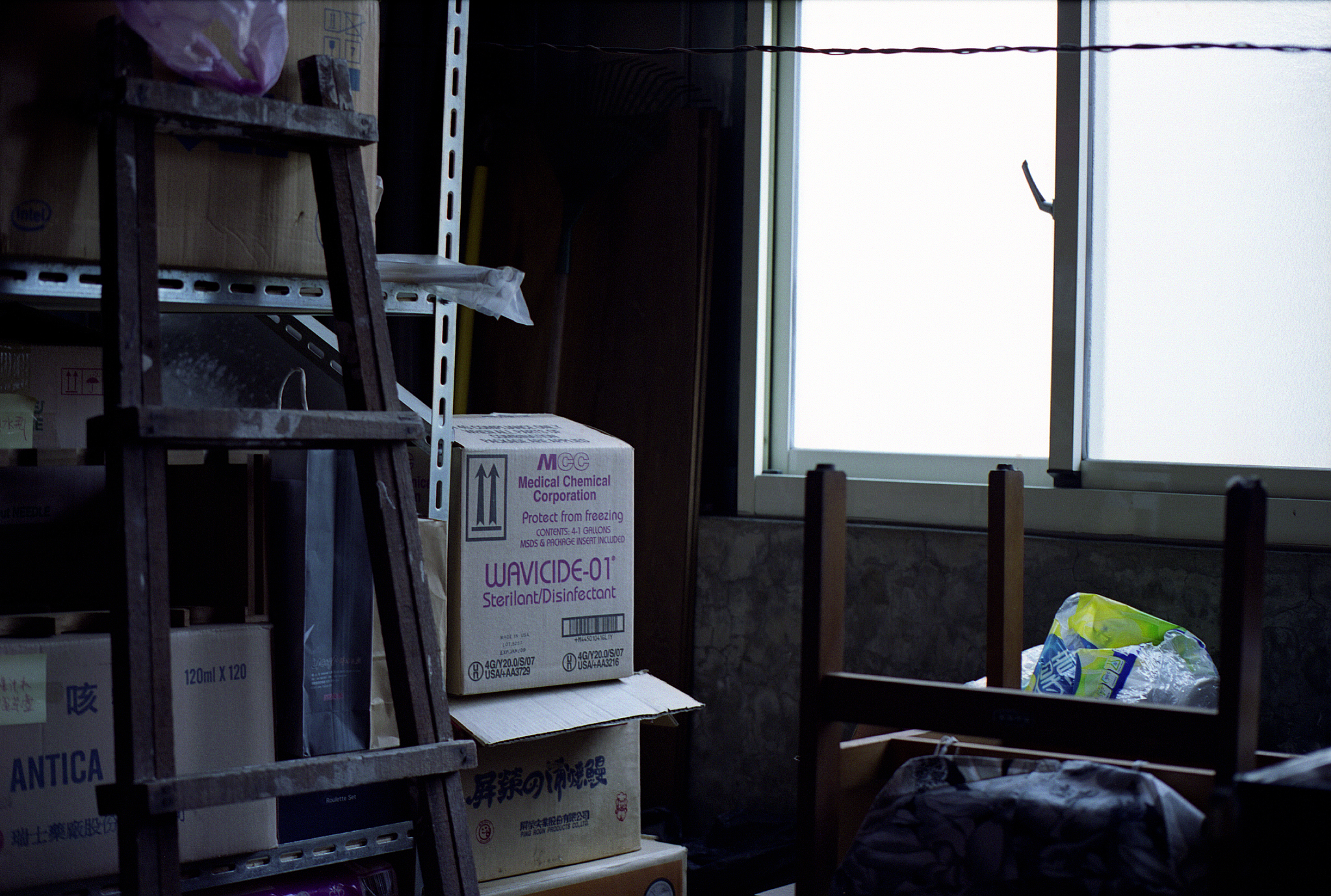 辛樂克颱風